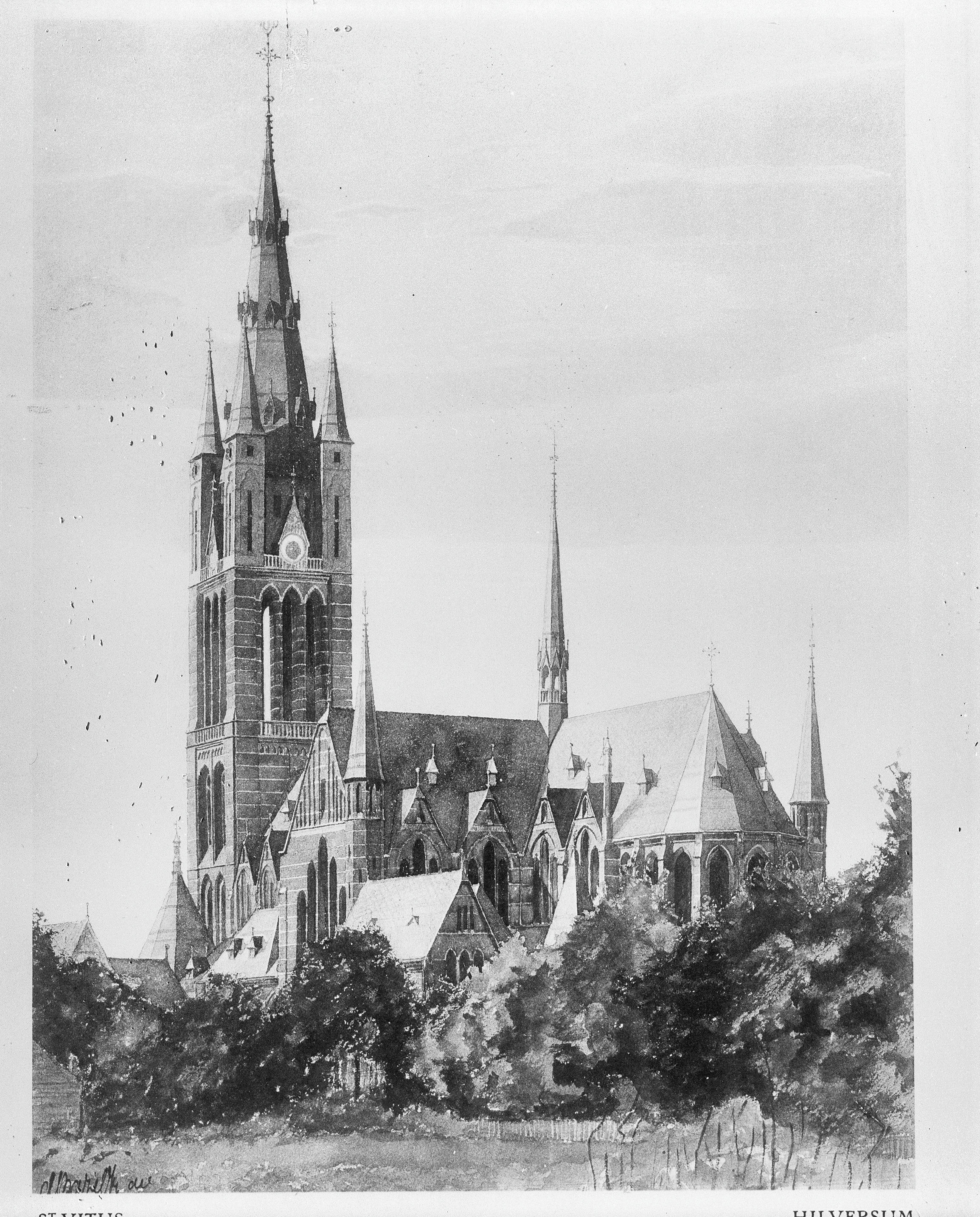 Rooms-katholieke Sint-Vituskerk: reproductie uit gedenkboek "Het werk van Dr.P.J. H.Cuypers" 1827-1917, aquarel van K.P.C. de Bazel